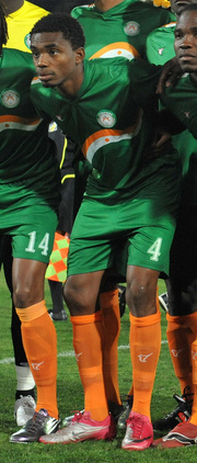 équipe du Niger en 2011